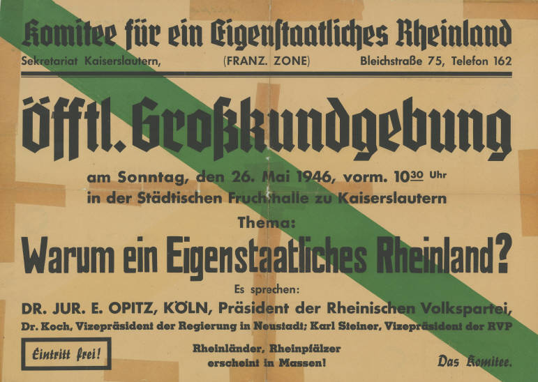 Öfftl. Großkundgebung ... Thema: Warum ein Eigenstaatliches Rheinland? Es sprechen: Dr. jur. E. Opitz, Köln, Präsident der Rheinischen Volkspartei Dr. Koch, Vizepräsident der Regierung in Neustadt Karl Steiner, Vizepräsident der RVP Rheinländer, Rheinpfälzer erscheint in Massen Eintritt frei! Das Komitee. Kommentar: Stark beschädigt; Beschriftungen und Stempel auf der Rückseite Plakatart: Ankündigungsplakat Auftraggeber: Komitee für ein Eigenstaatliches Rheinland Objekt-Signatur: 10-044 : 600 Bestand: Allgemeine Plakate aus den Besatzungszonen (10-044) GliederungBestand10-18: Allgemeine Plakate aus den Besatzungszonen (10-044) » Sonstige Lizenz: KAS/ACDP 10-044 : 600 CC-BY-SA 3.0 DE